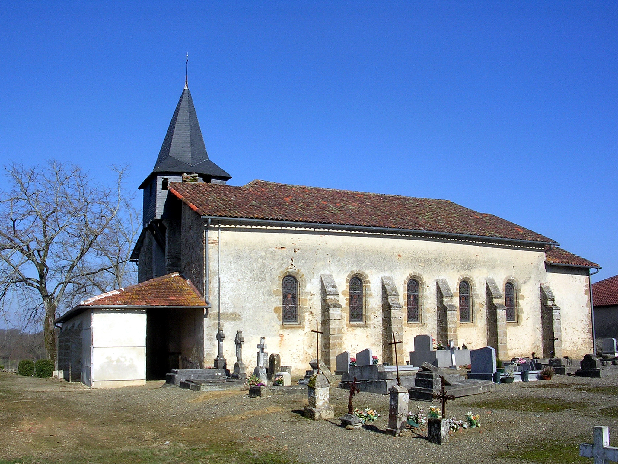 Eglise Sainte-Marie-Madeleine de Loubens à Hontanx, dans le département français des Landes